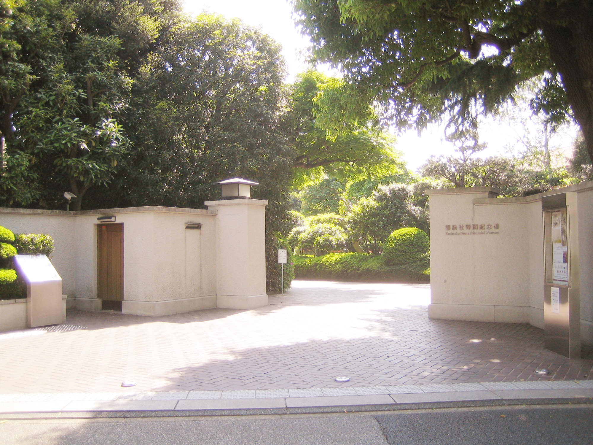 Kodansha Noma Memorial Museum (講談社野間記念館), in Bunkyo, Tokyo, Japan